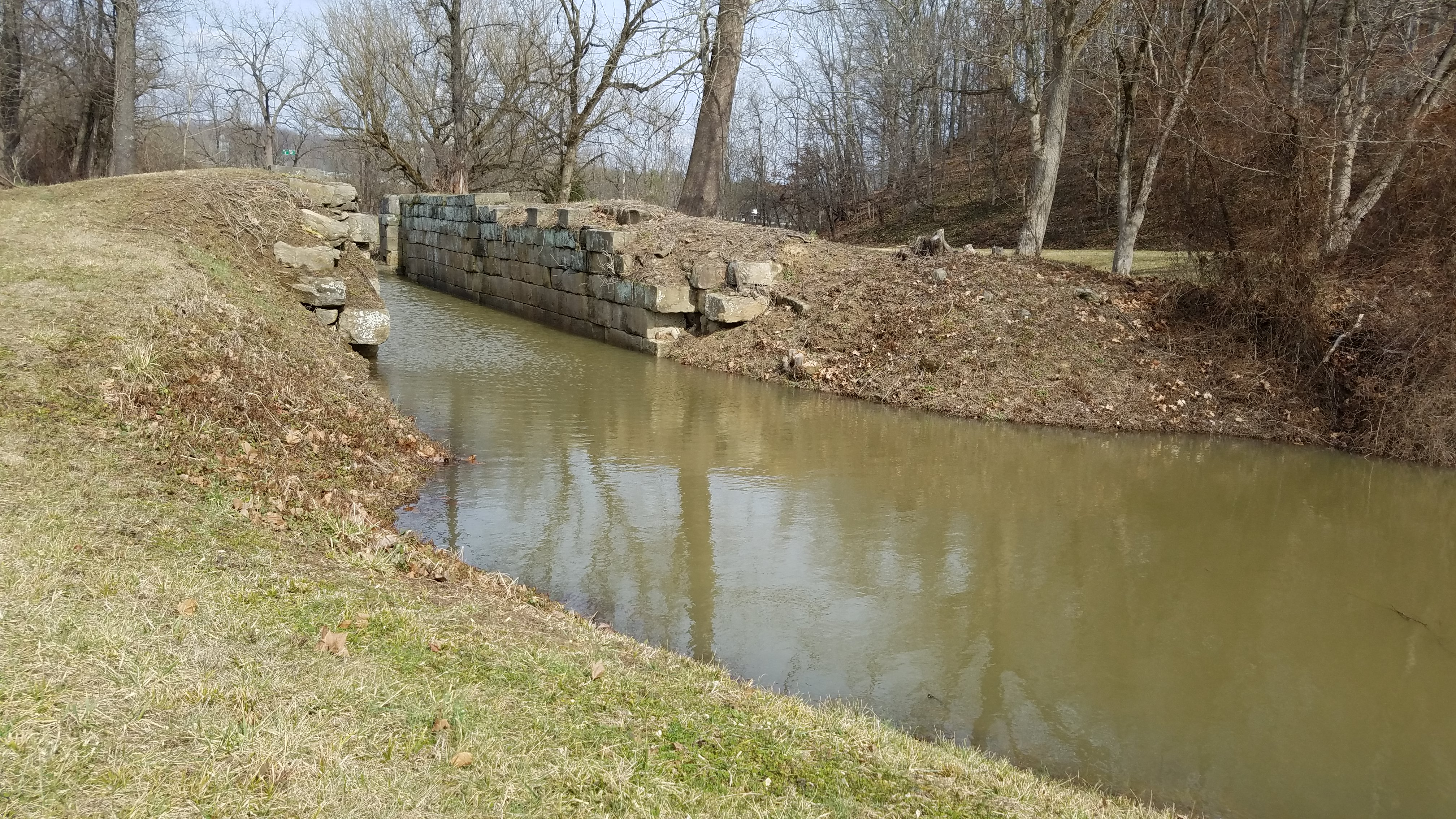 Hocking Canal Lock 17, Haydenville, Ohio.